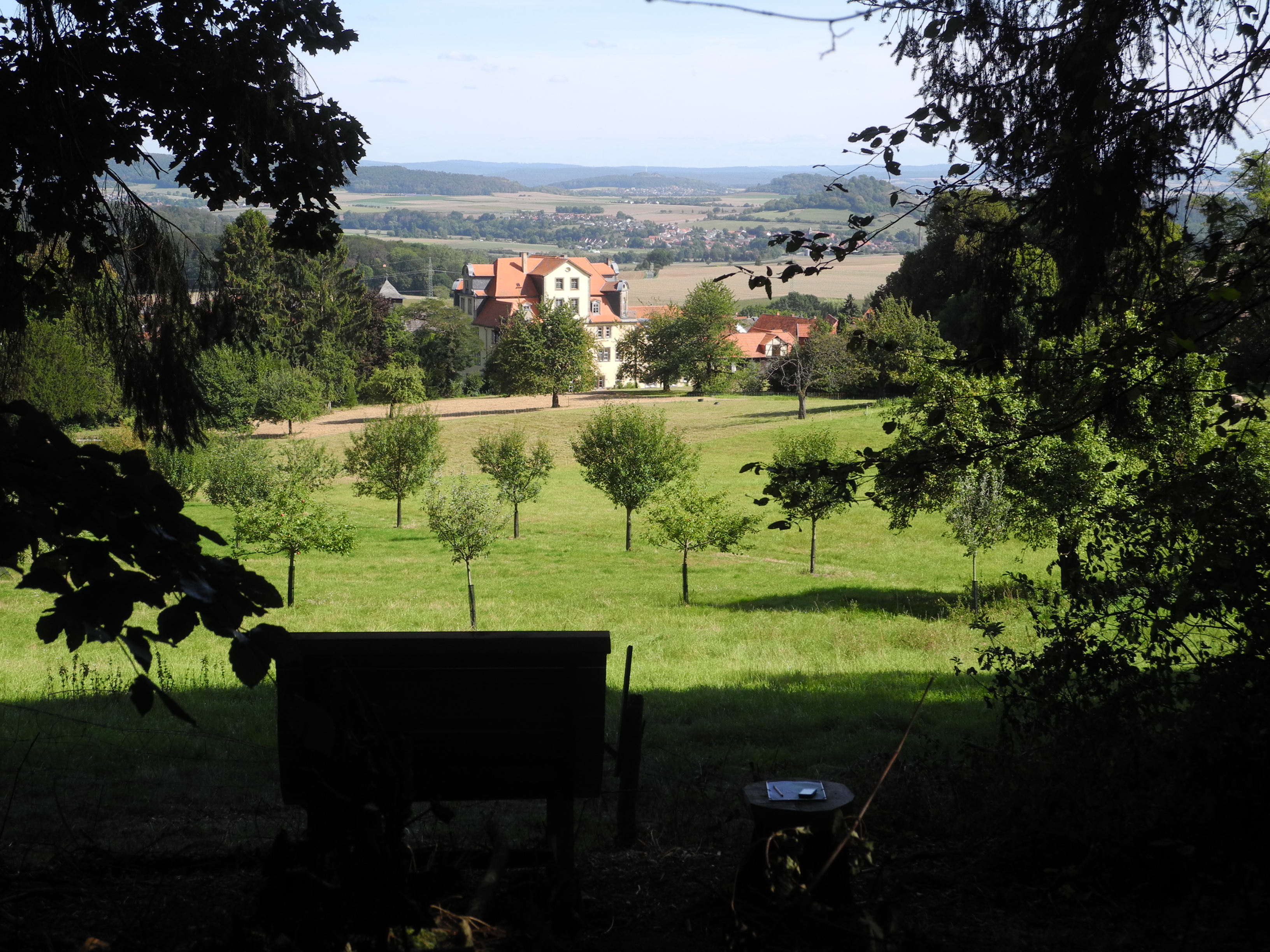 Blick vom Waldrand nach Westen, über den Tiergarten zum Schlosspark Riede mit Schloss Riede, Hessen, Deutschland. Aussichtspunkt Schlossblick mit hölzerner Sitzliege und Beistelltisch.